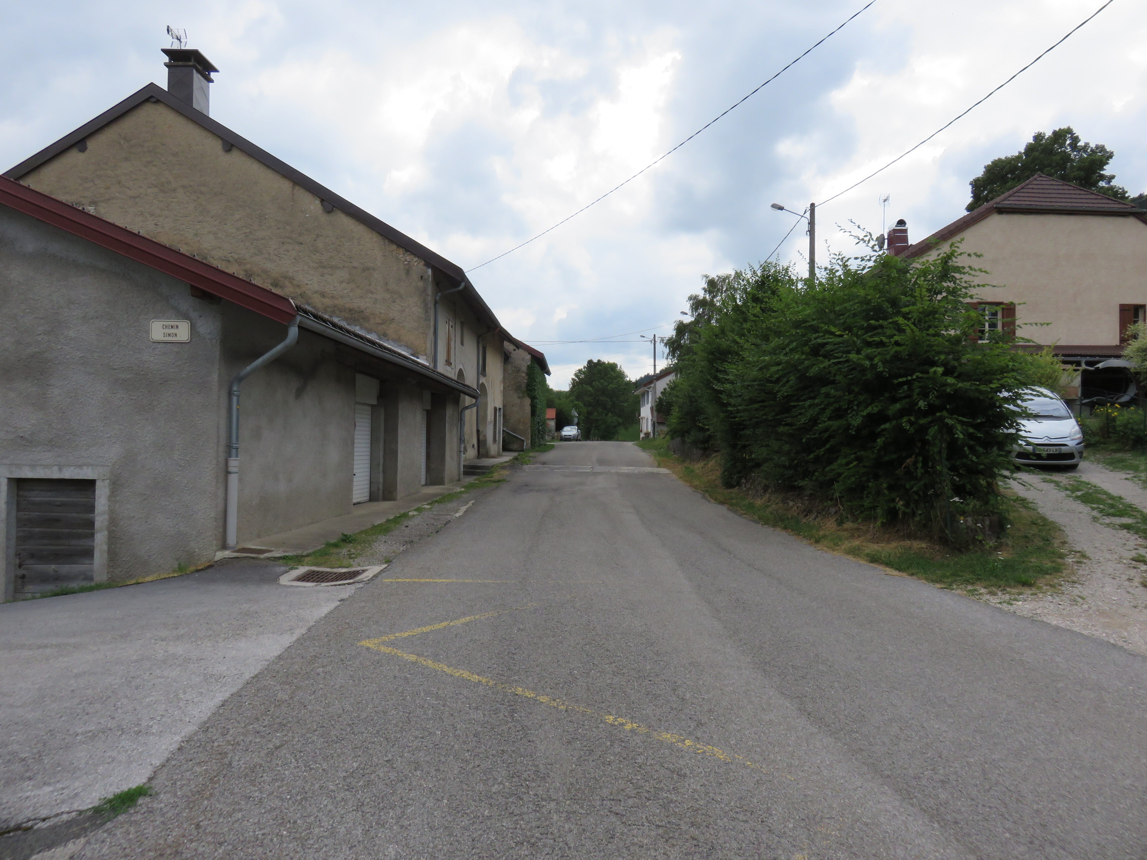 Route de la Vallée (direction La Rixouse) à Villard-sur-Bienne (Jura, France).